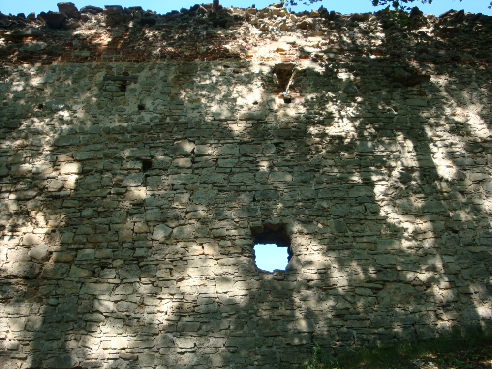 Konvendihoone varemed.